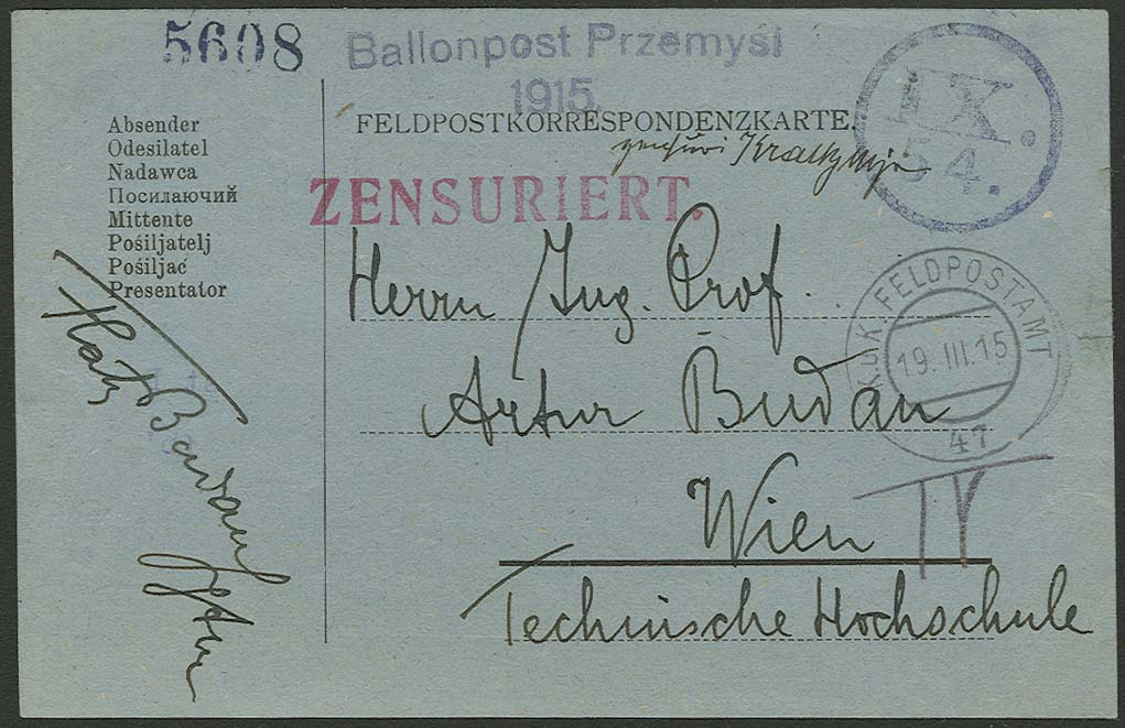 ÖSTERREICH 1915, Ballonpost Przemysl, blaue Feldpostkarte Nr. 5608 mit Grußtext geschrieben 23.1., violetter L2 "Ballonpost Przemysl 1915" und L1 "Zensuriert", Transit. Adressiert an: Herrn Ing. Prof. Artur Budan, Wien IV, Technische Hochschule.